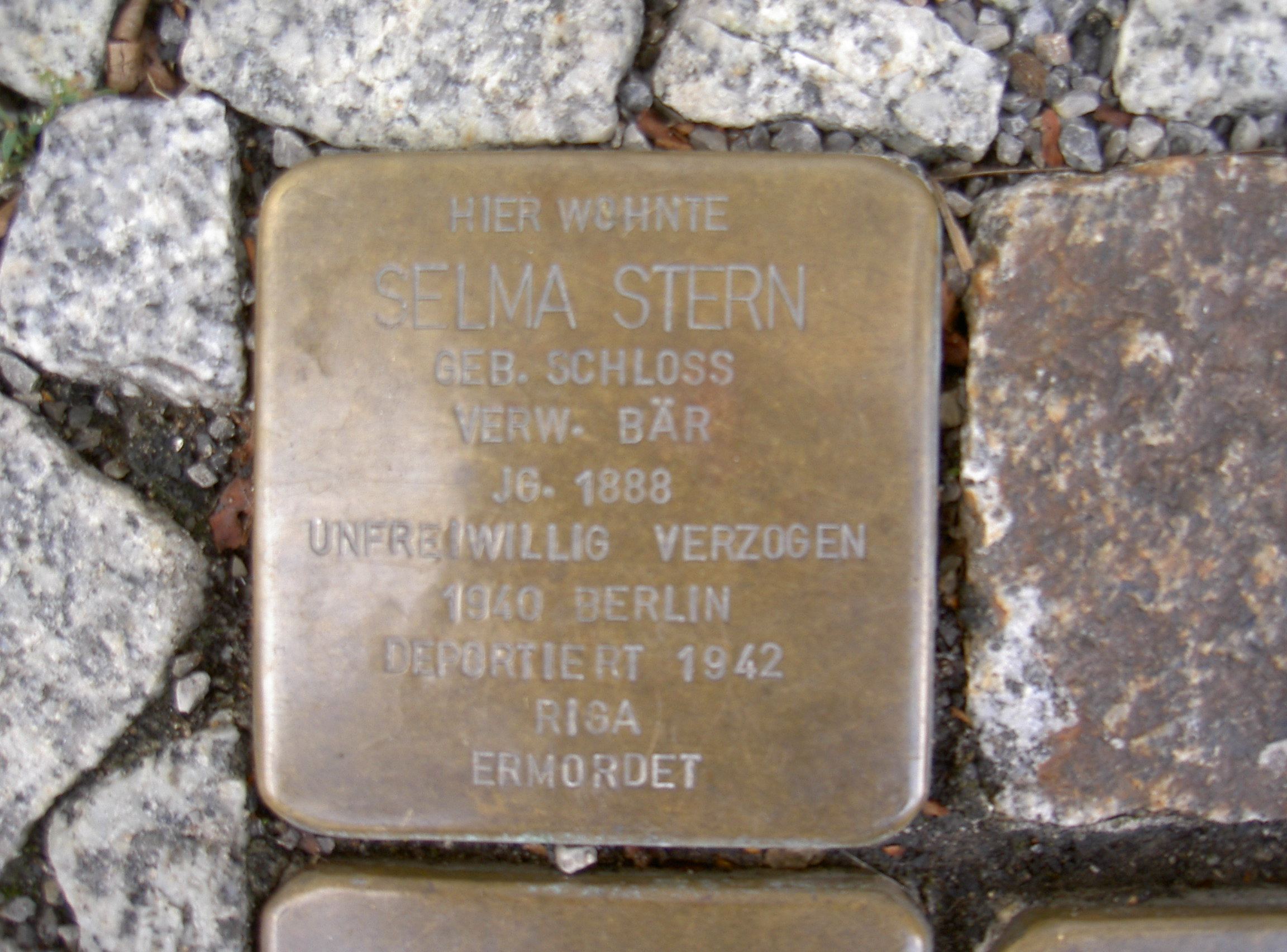 Stolperstein in Themar Markt 8 Stern Selma